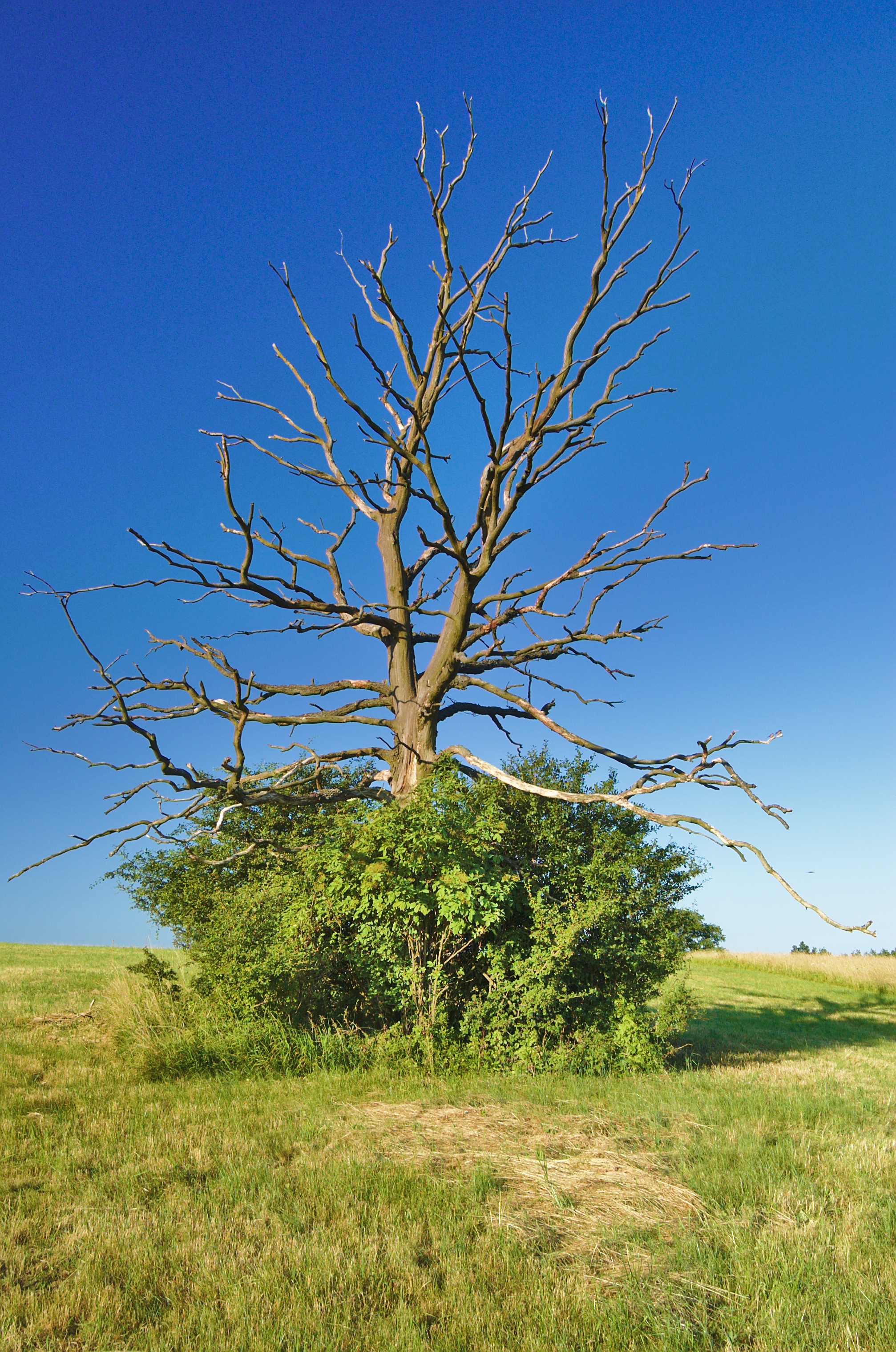 Národní přírodní rezervace Porážky, okresy Hodonín a Uherské Hradiště